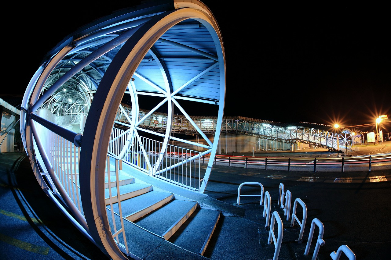 道の駅にらさきの歩道橋。Panoramioより転載